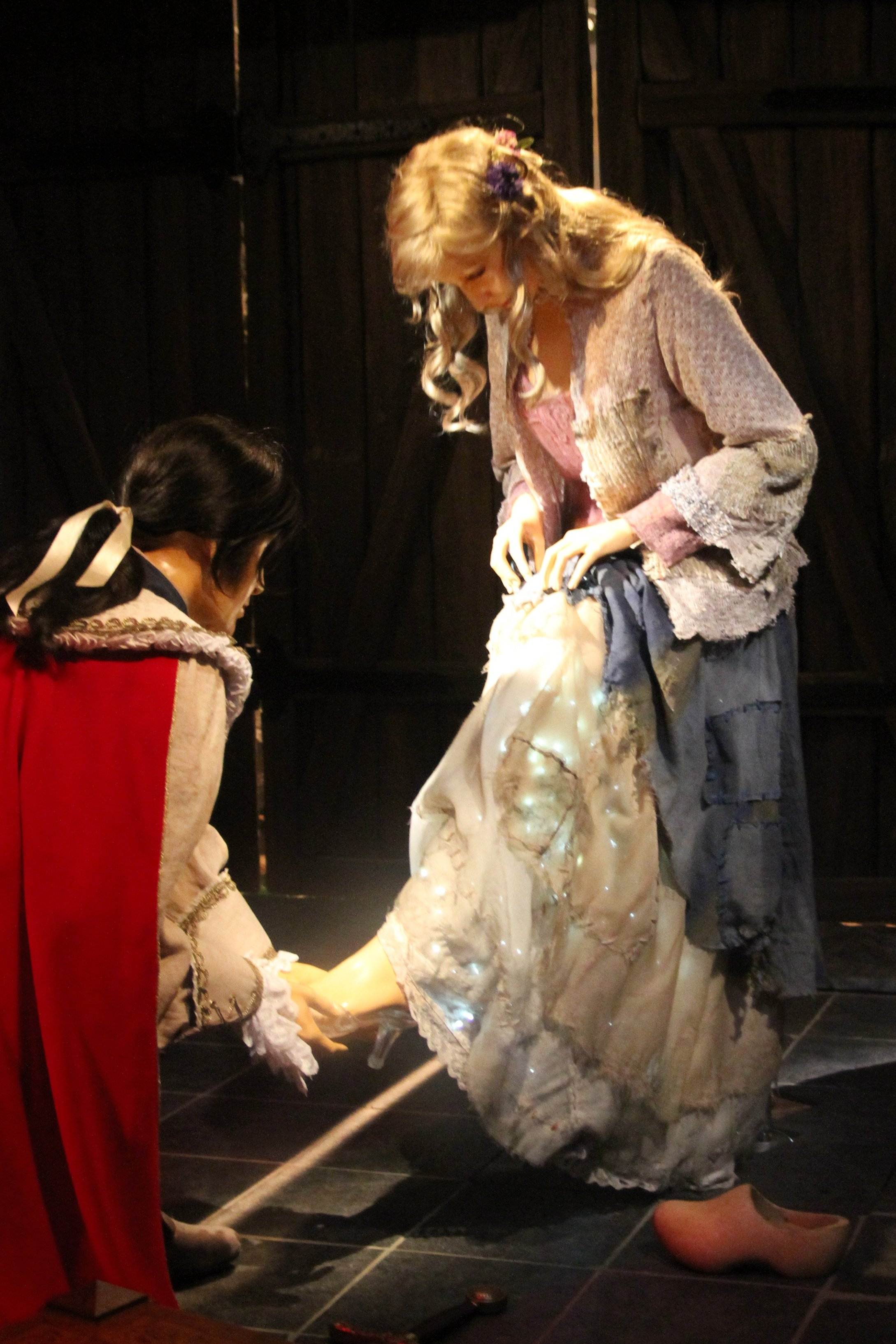 Assepoester